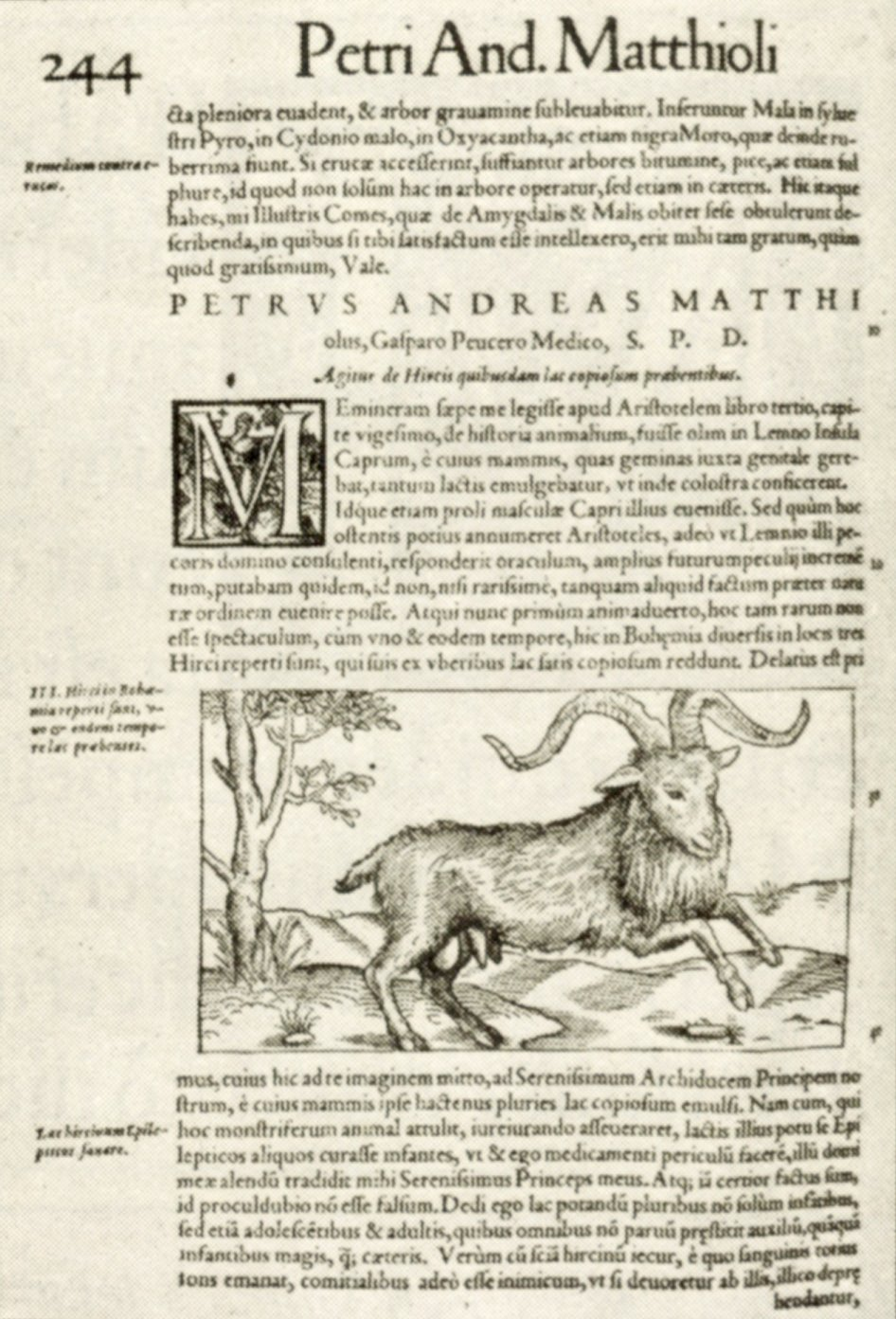 Textová stránka z knihy Epistolarum Medicinalium libri quinque